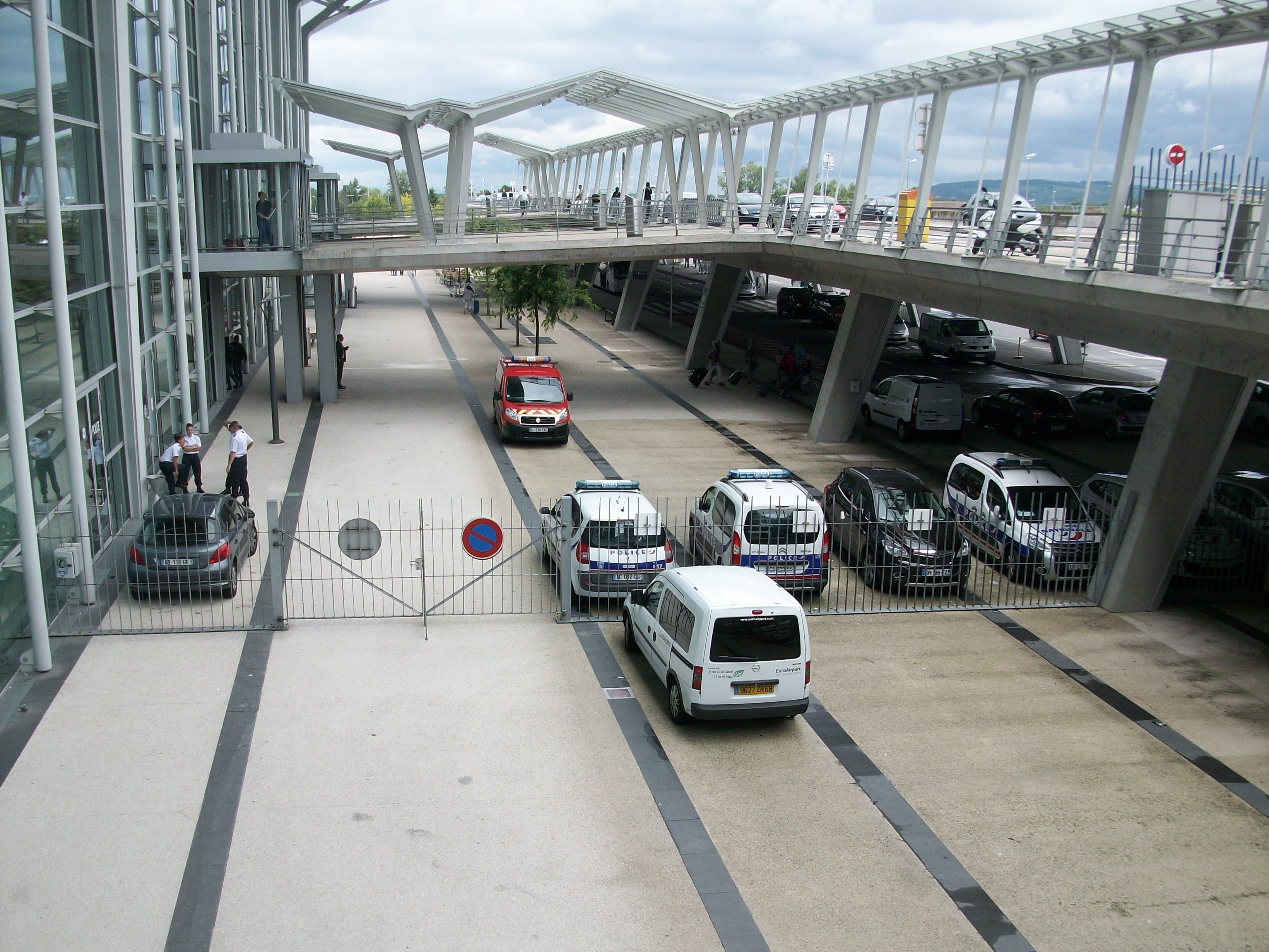 Frontière extérieure de l'EuroAirport, vue depuis le côté Suisse de l'EuroAiport. En effet cette terre est, toujours temporairement, la Suisse. Ce n'est pas un exclave.